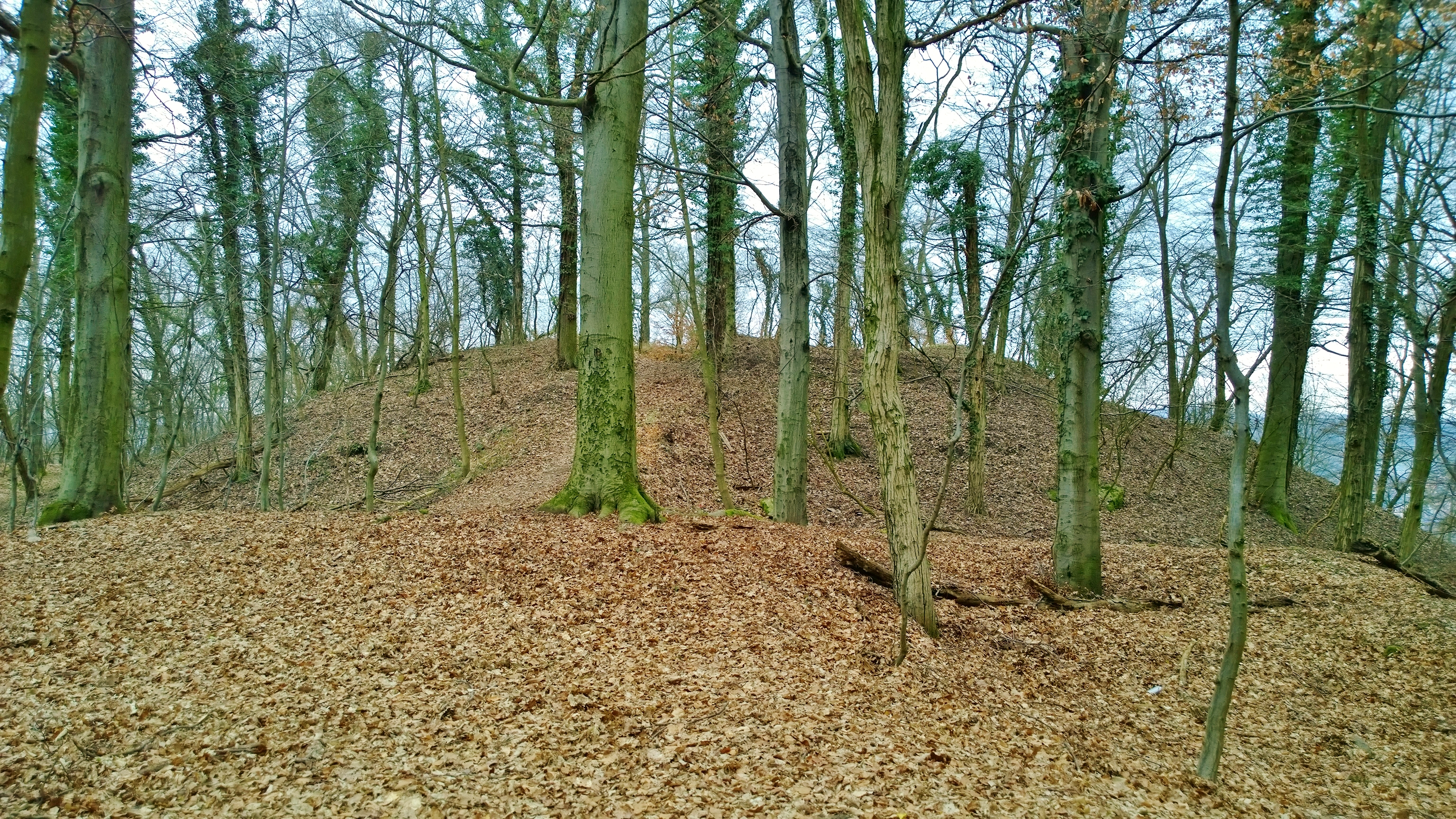 Burgstall Kugelburg, Turmhügel